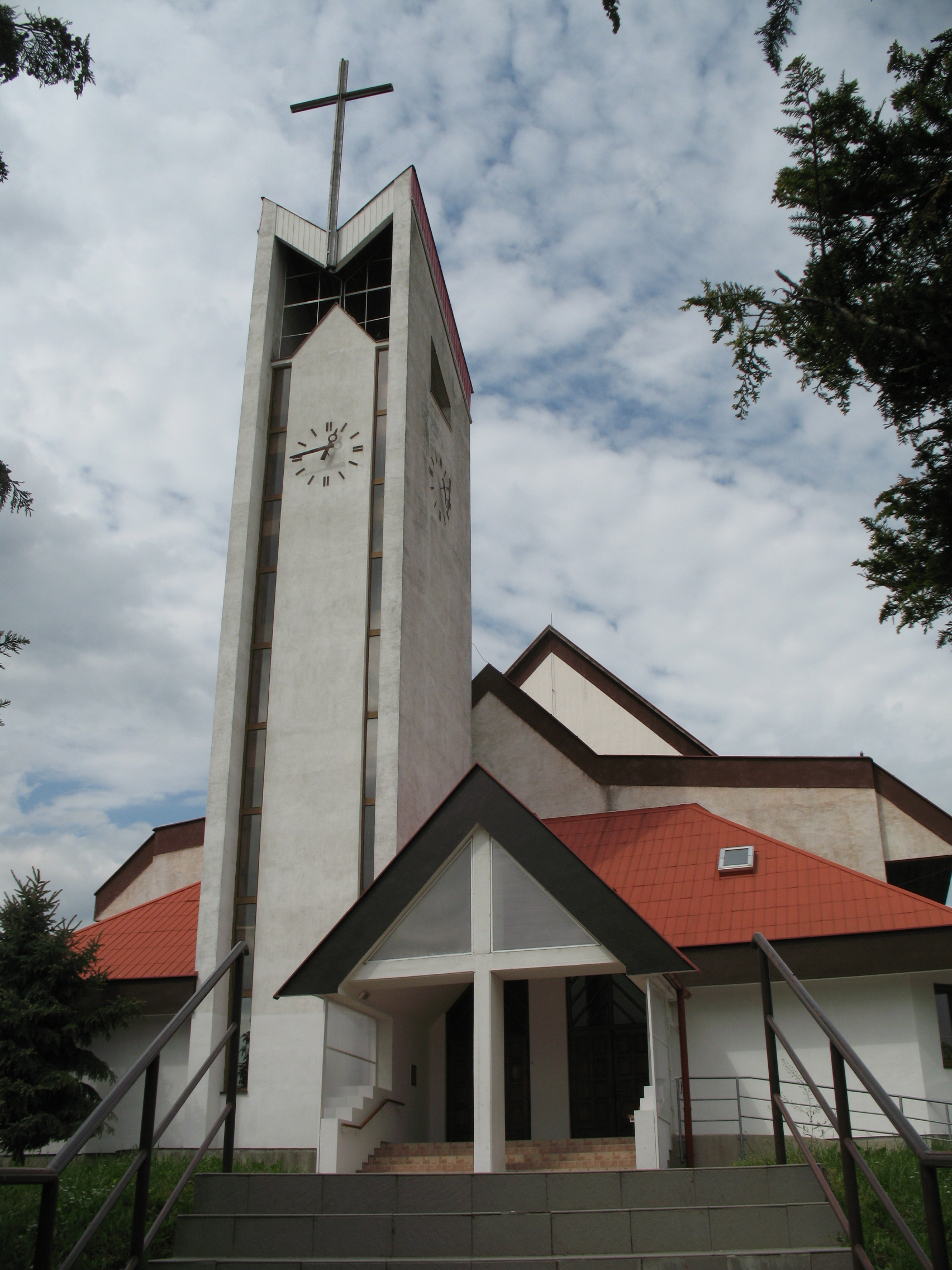 Királyi